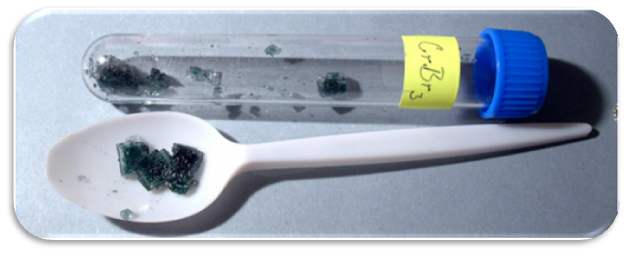 Bromid chromitý - CrBr3